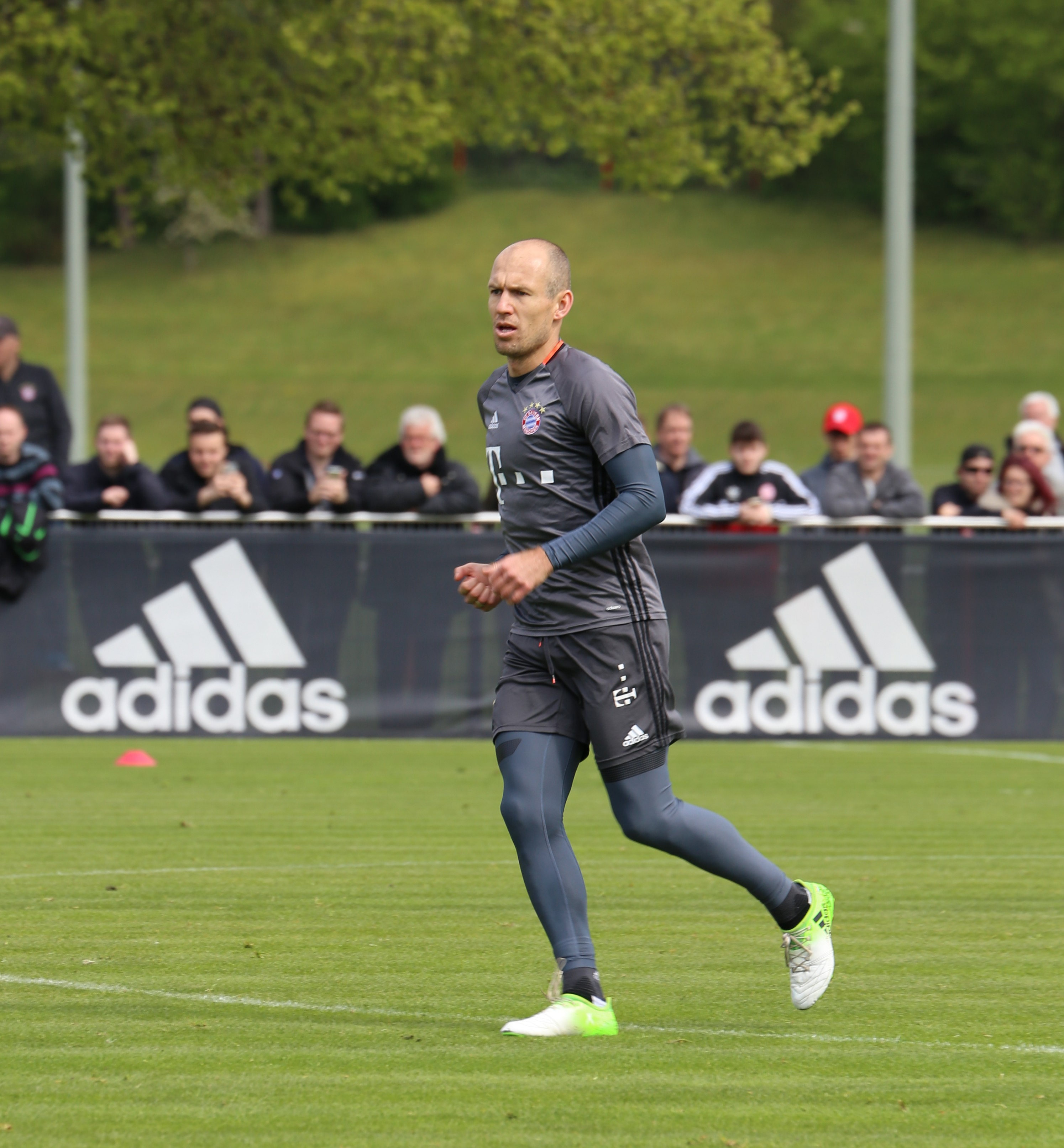 Arjen Robben, am 3. Mai 2017 beim Training auf dem Gelände des FC Bayern München